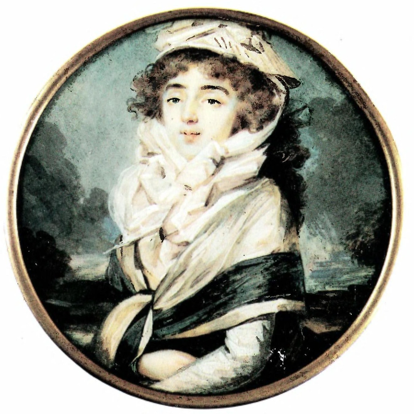 Наталья Петровна Куракина, ур. Нарышкина (1758—1825), была замужем за князем С.Б.Куракиным.